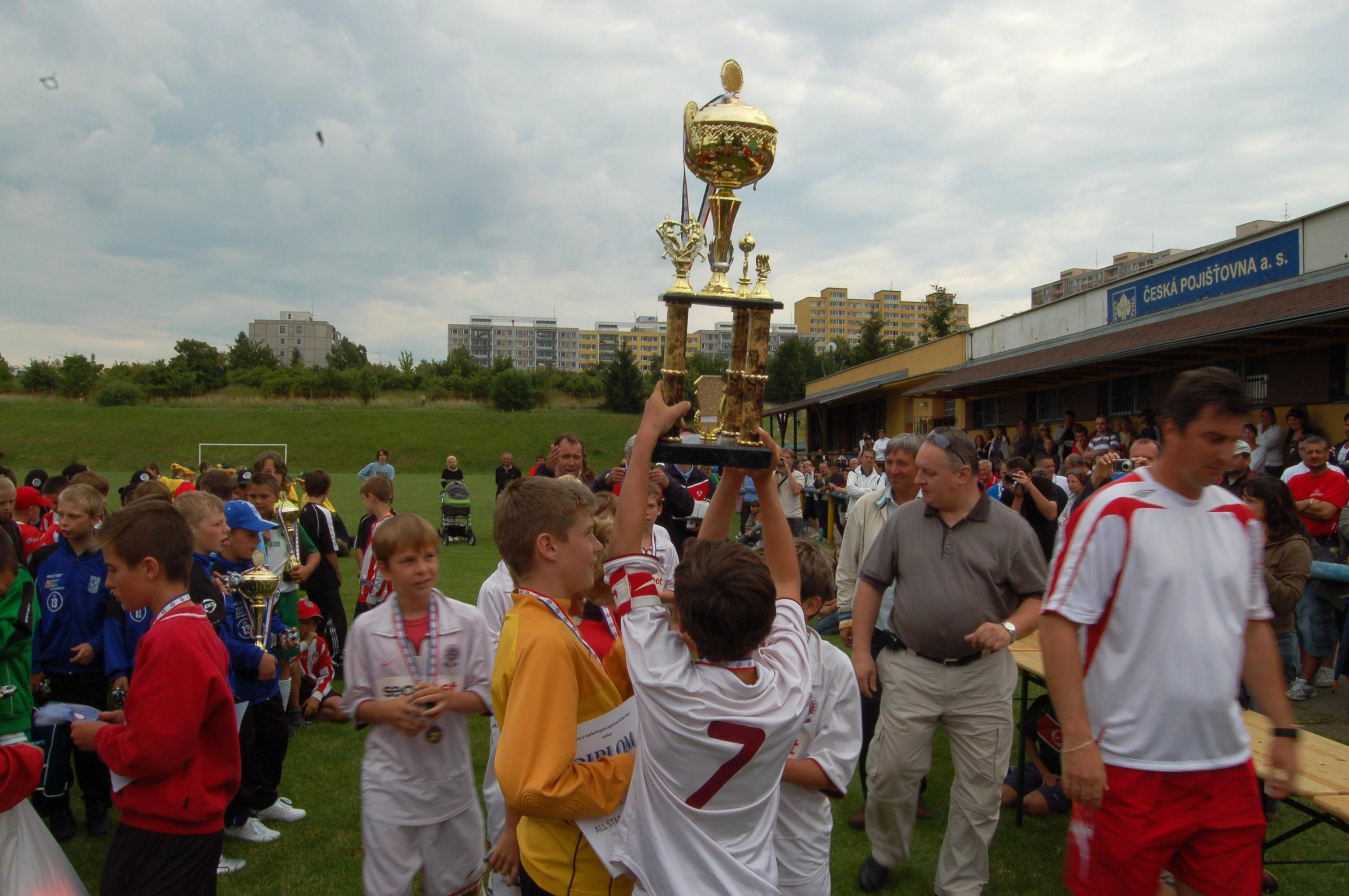 vítěz ASC 2009 AC Sparta Praha